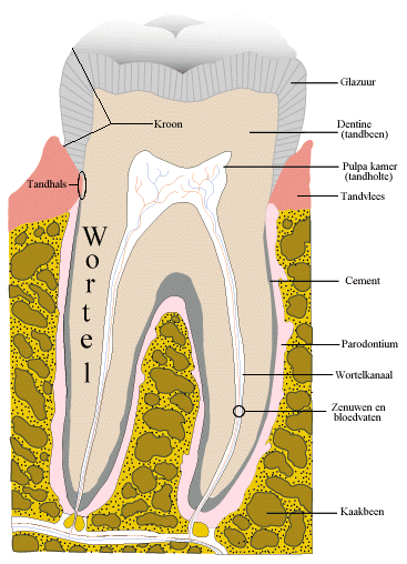 Dwarsdoorsnede van een tand.